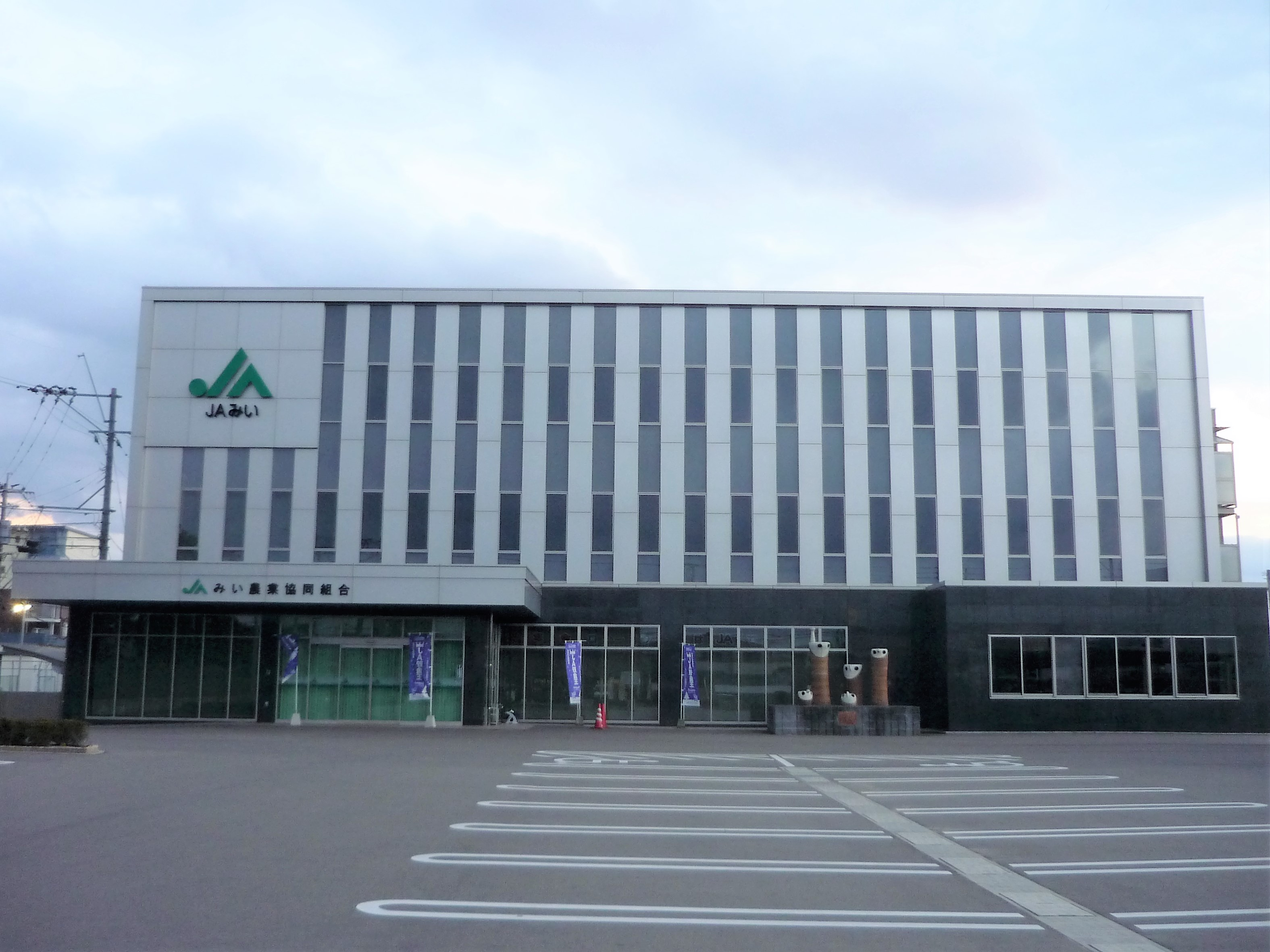 みい農業協同組合 本店・小郡中央支店（小郡市大板井） Panasonic Lumix DMC-FS3